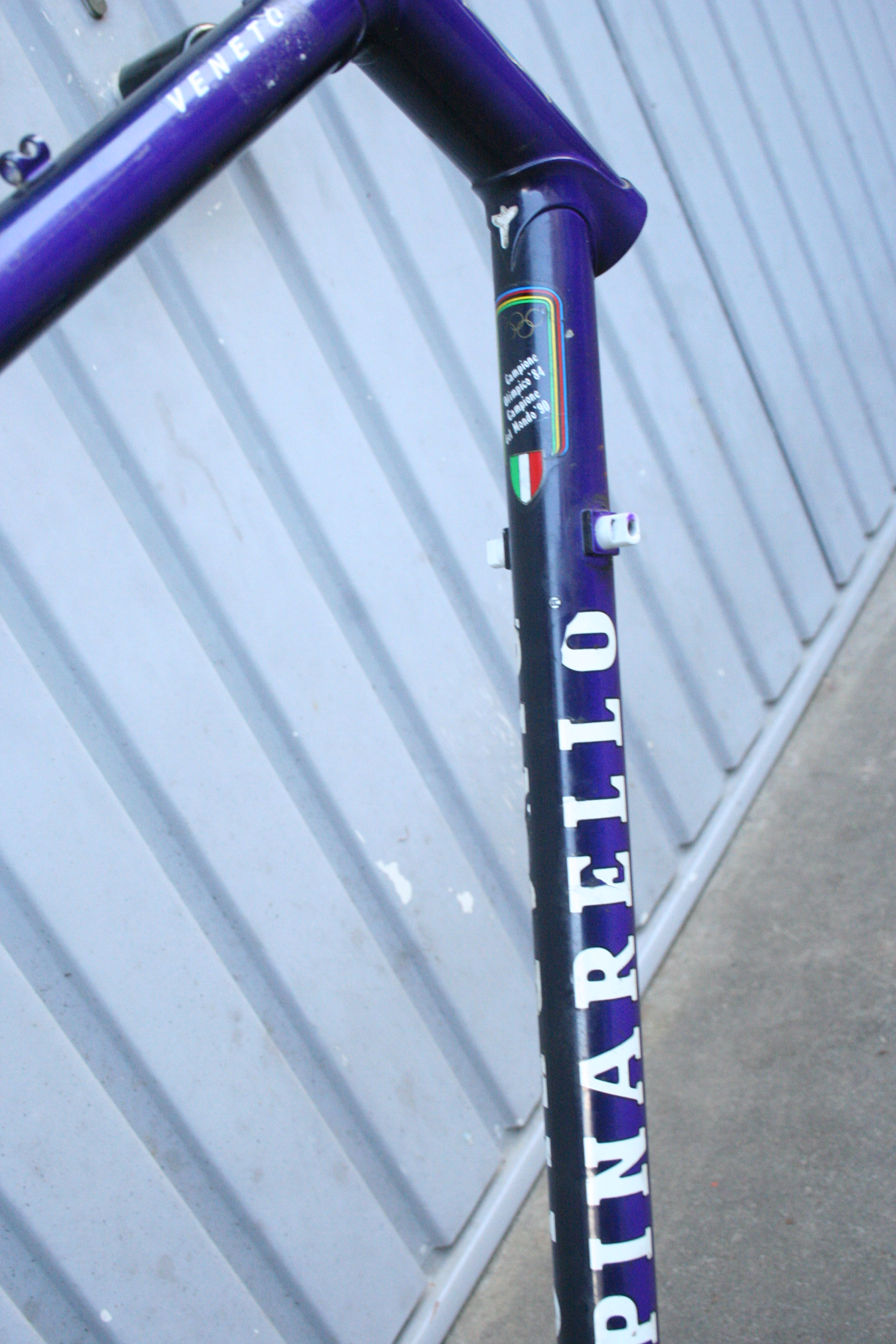 Pinarello Road Bike Frame